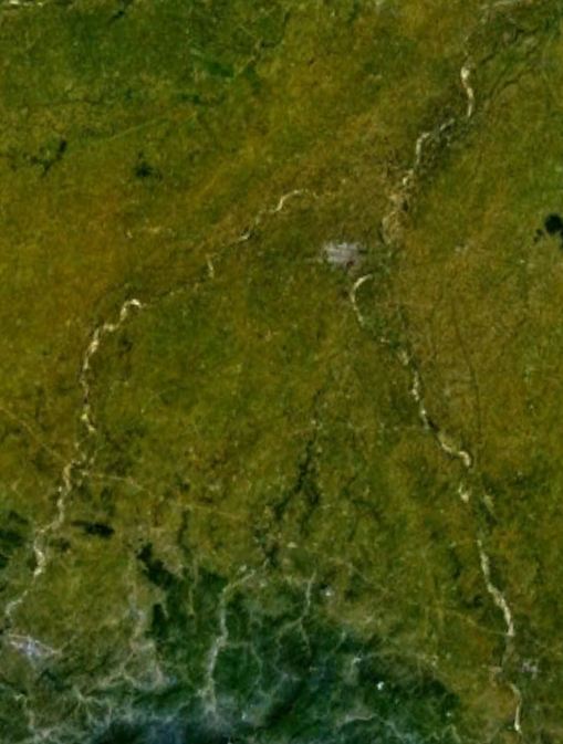 固始县卫星地图